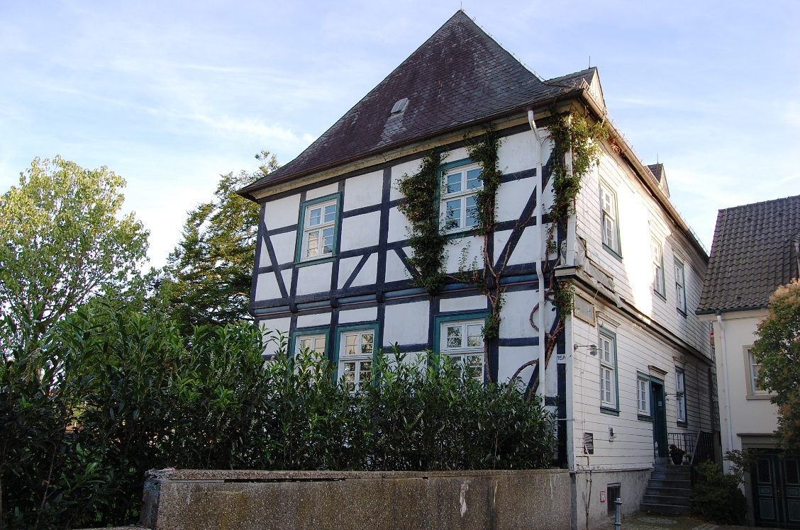 Arnsberg-Neheim: Drostenhof Burgstraße